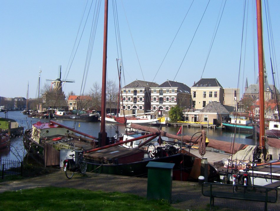 Binnenvaartmuseum in de Turfsingel in Gouda. Eigen foto, gebruik vrij Categorie:Afbeelding Gouda